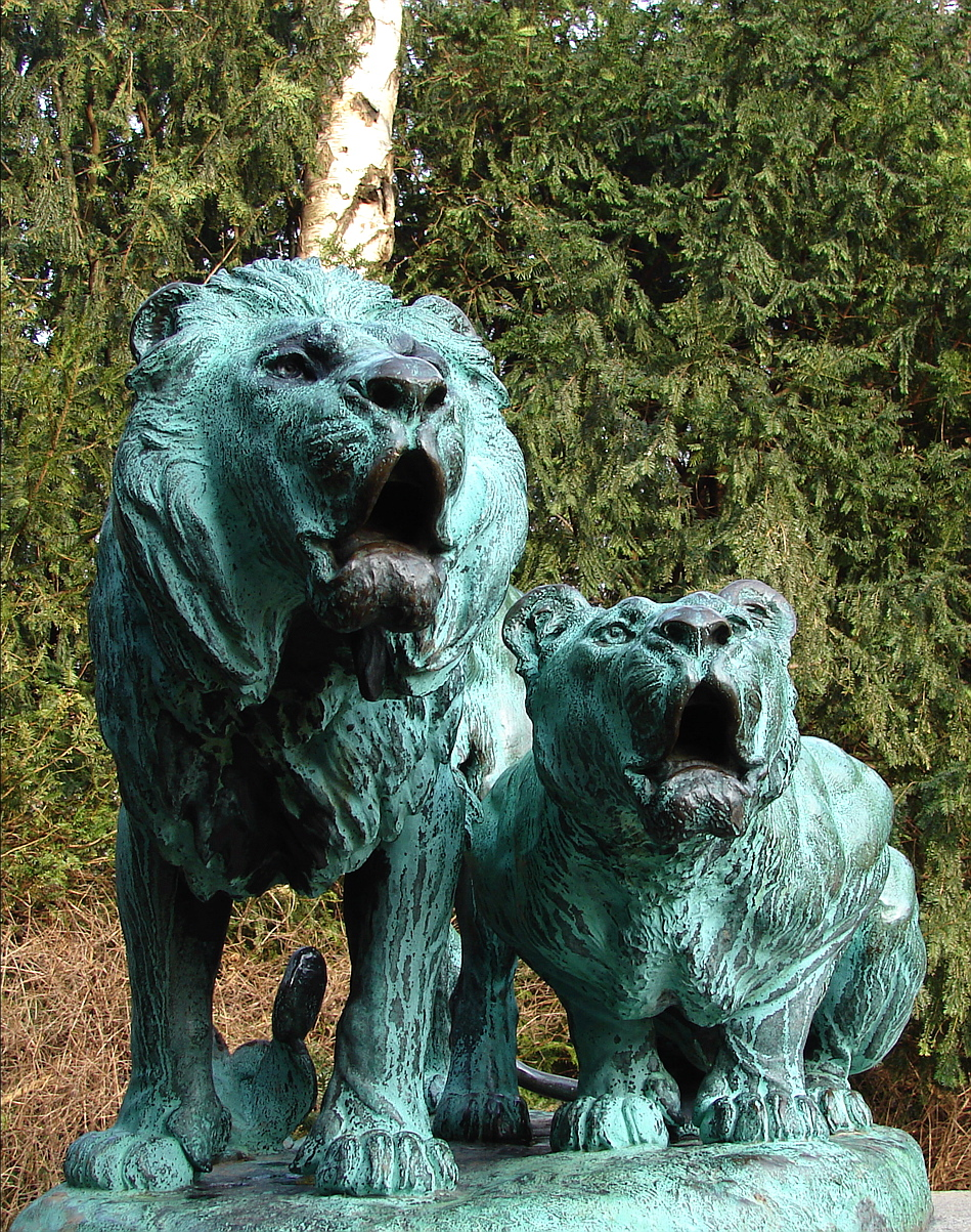 Lauritz Jensen (1859 - 1935), To løver eller De utilfredse, bronze og granit, 1905, Klosterfælleden, København